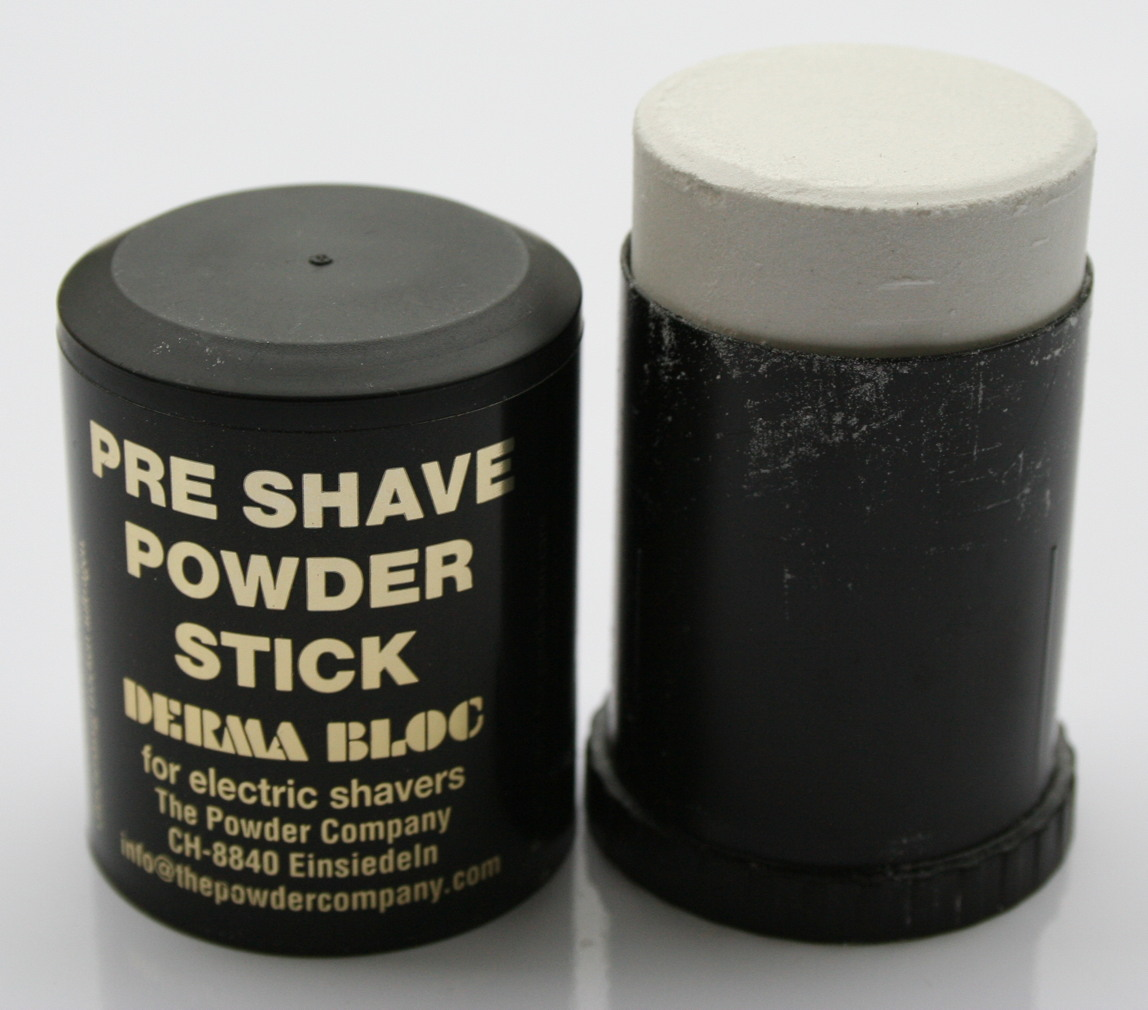 Rasierpuder